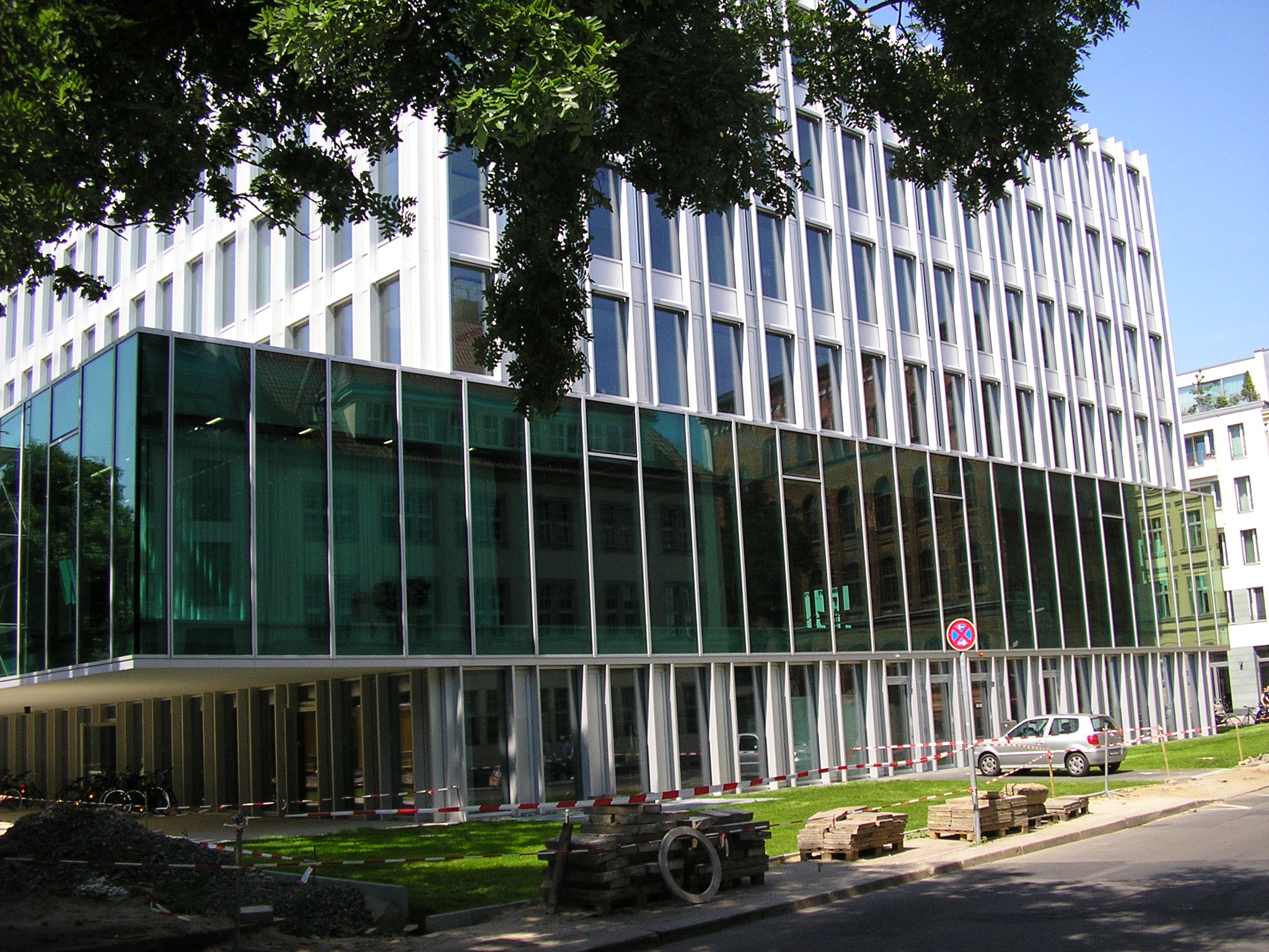 Zentrale der Heinrich-Böll-Stiftung, 10117 Berlin, Schumannstaße 8